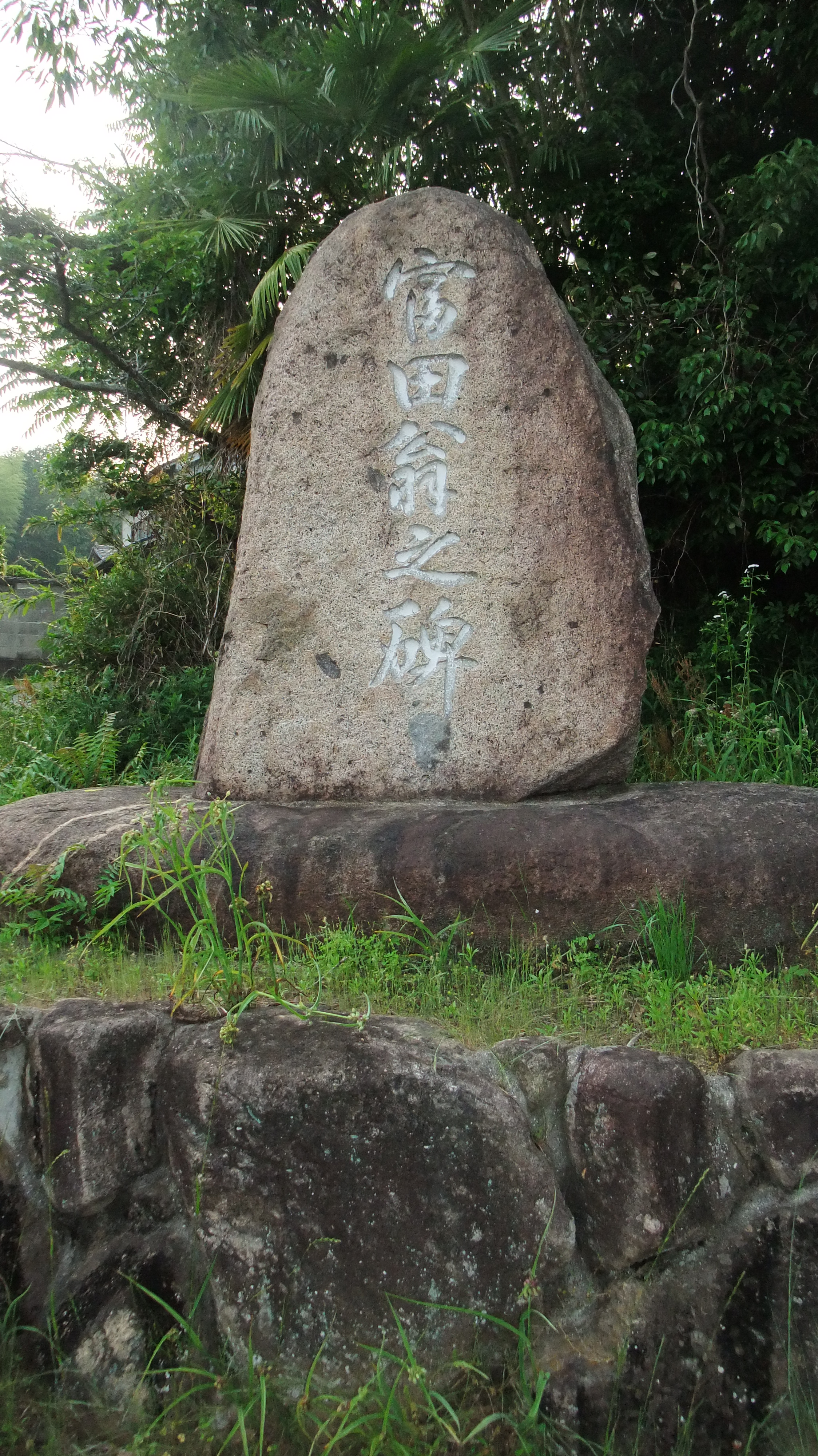 広島県福山市芦田町下有地に存在する、富田久三郎の功績を称える石碑。備後絣協同組合が建立したもの。